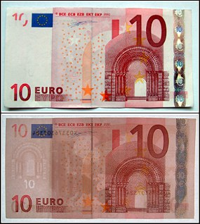 Wasserzeichen auf 10 EUR BanknoteUrheber des Fotos: Anton (rp) 2004